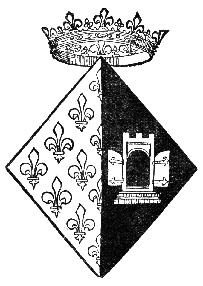 Уявний герб Анни Ярославни з гербами Франції та Русі (Московії) . В описі книги: (Анна або Агнеса, донька Георгія Мудрого, короля Русі, або Московії, дружина Генріха Першого).